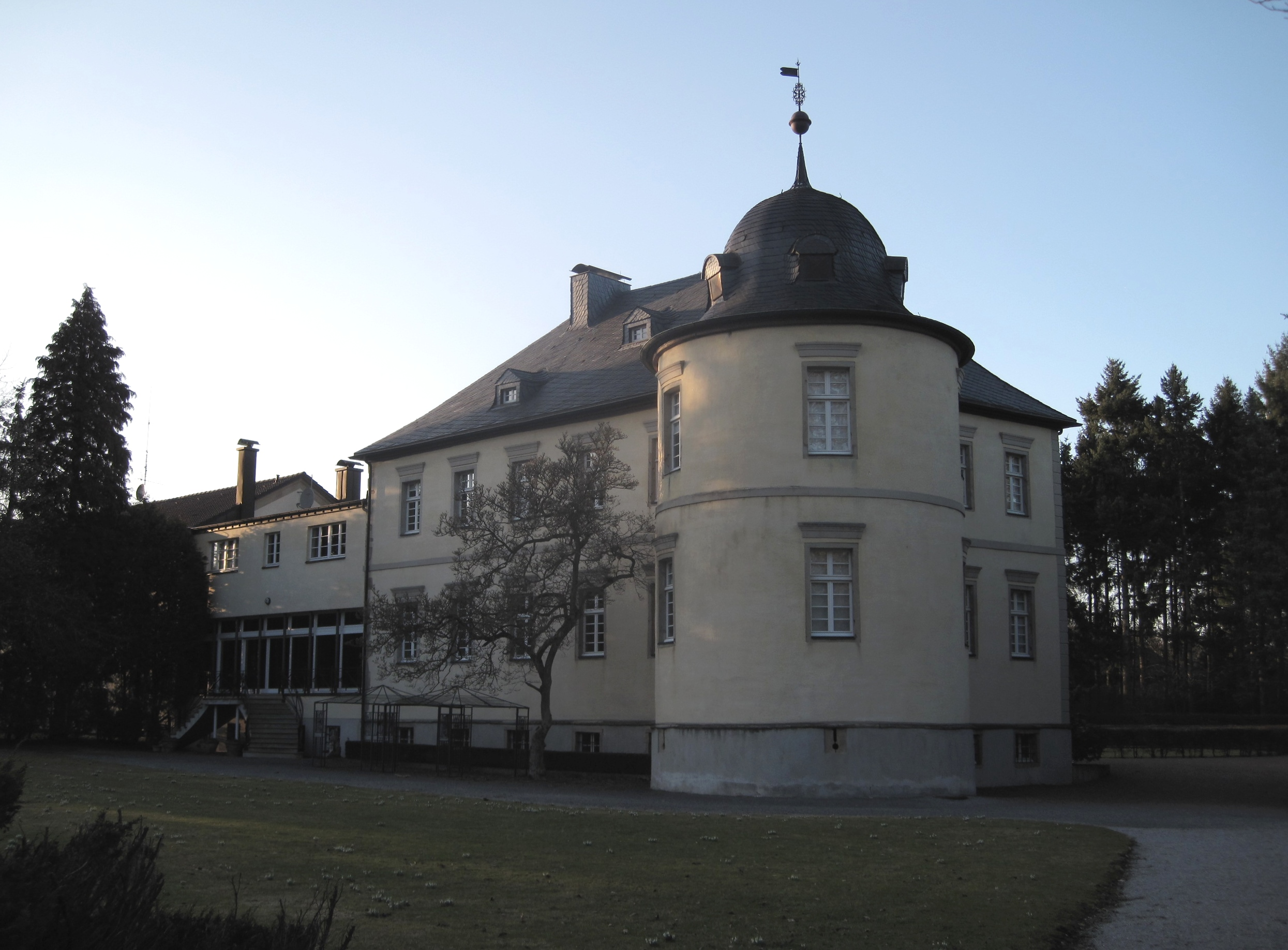 Ehemaliges Rittergut Edelburg in Hemer.